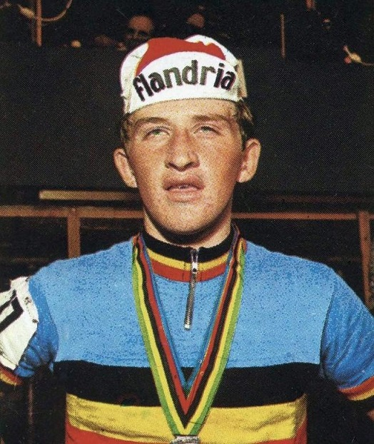 Freddy Maertens (1971, Belgium amateur road champion), 'Munchen 72', Panini figurina n°136.